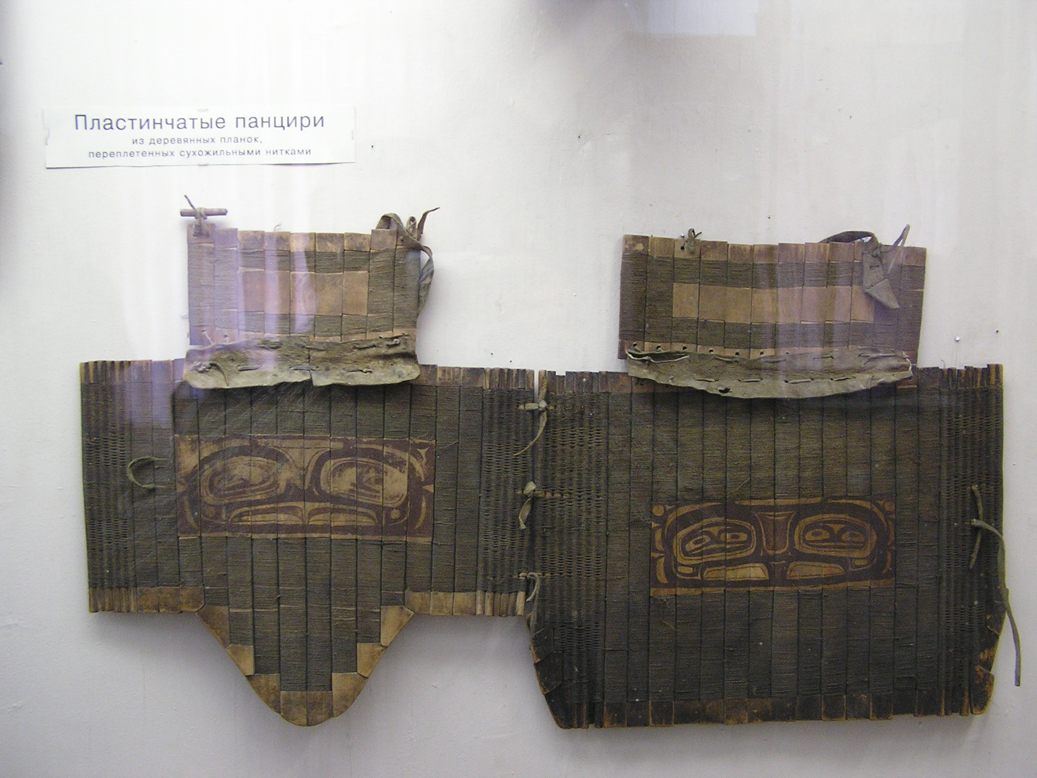 Санкт-Петербург. Музей антропологии и этнографии имени Петра Великого Российской академии наук (Кунсткамера). Пластичатый панцирь из деревянных планок